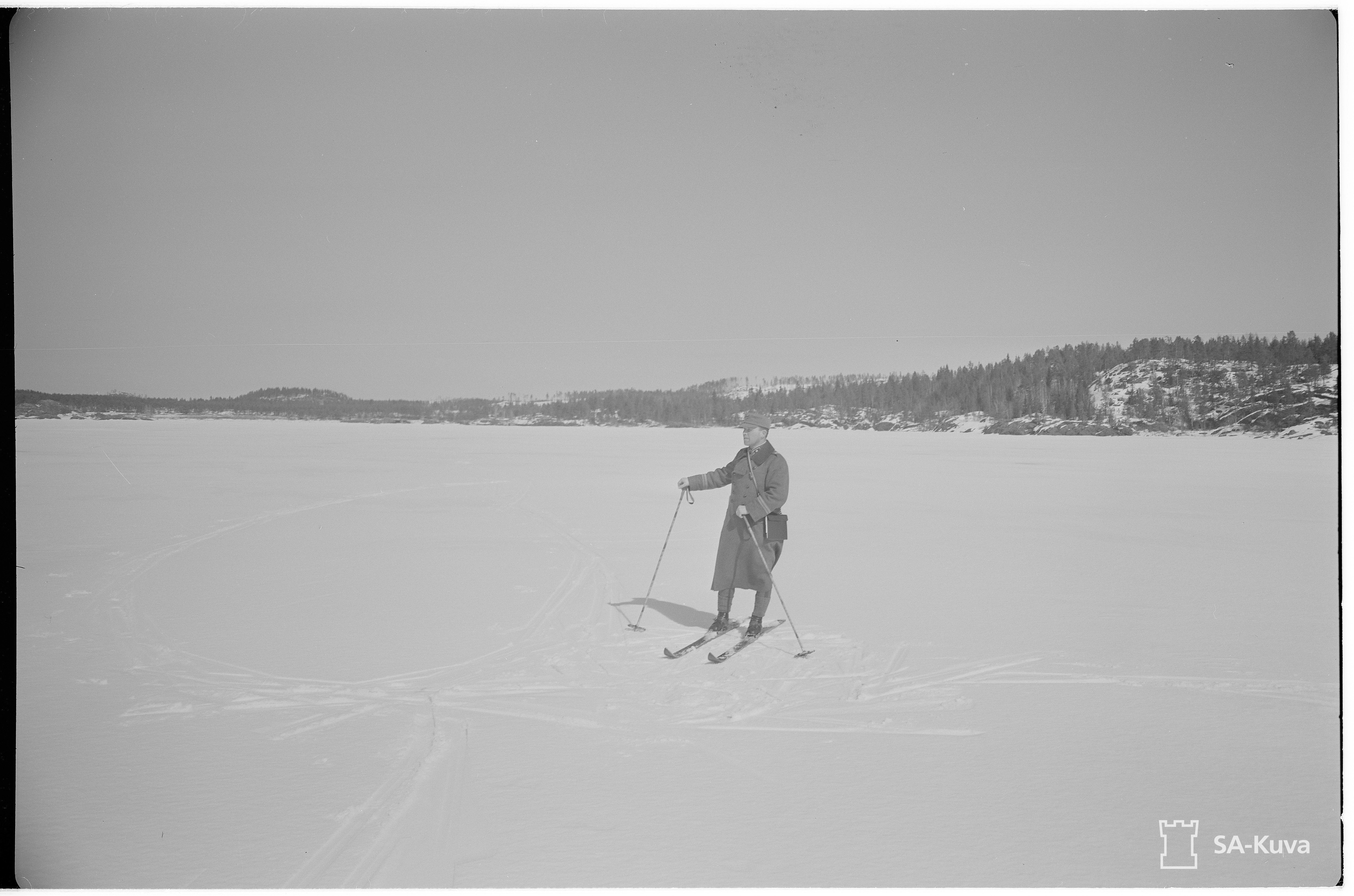 Pastori Elias Simojoen kaatumispaikka Nuoratsaaren ja Konnunsaaren välissä 16.4.1944. Kuvassa seisomassa majuri Matti Koskenmies.